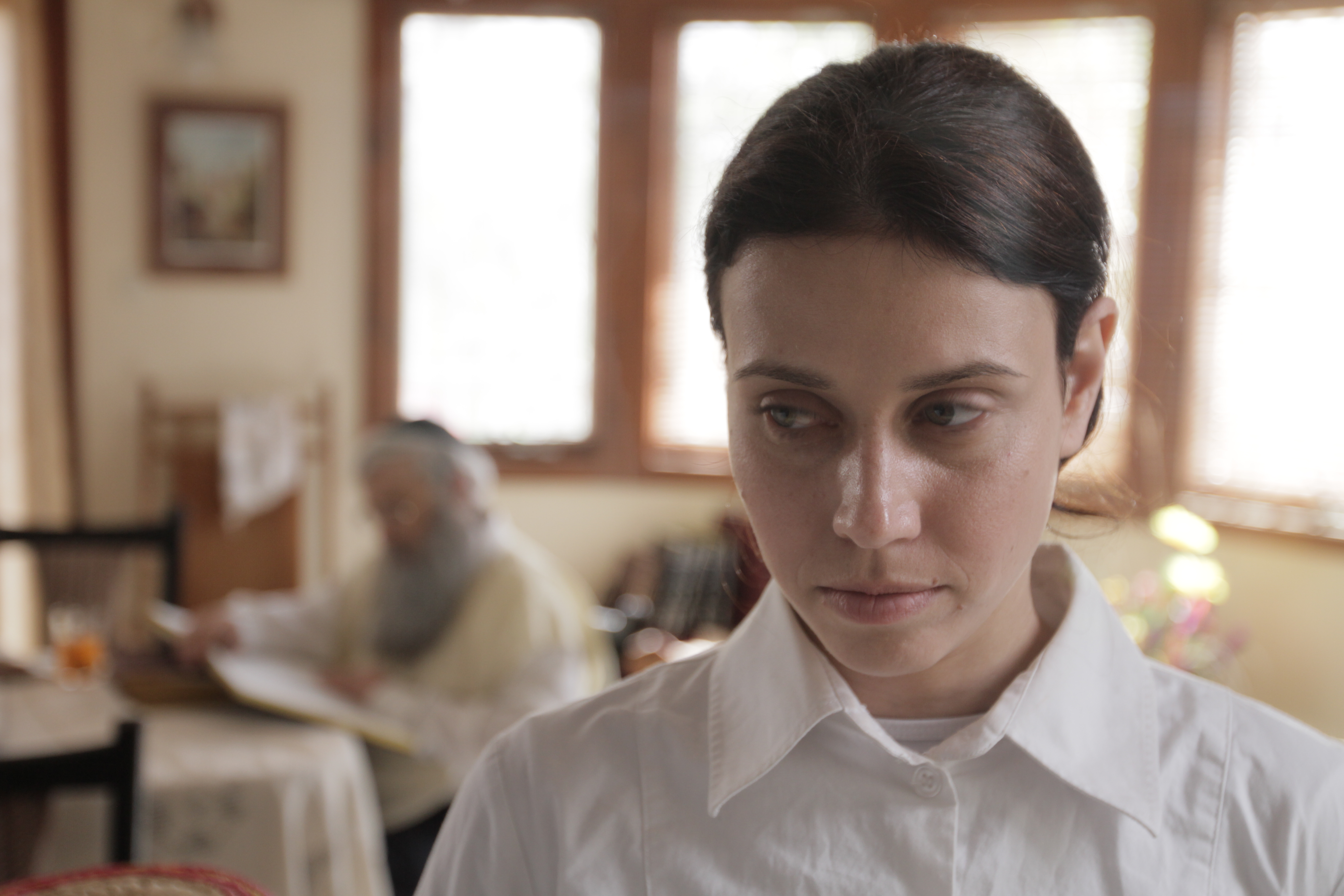 ליאת אזר בסרט אחותי את